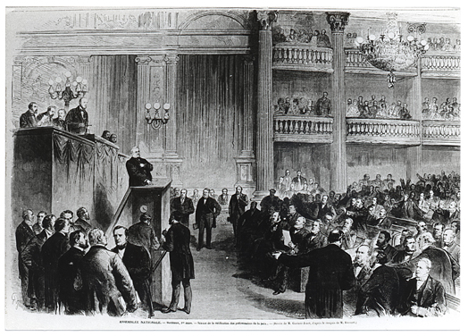 L'Assemblea Nazionale francese a Bordeaux il 1° marzo 1871, disegno